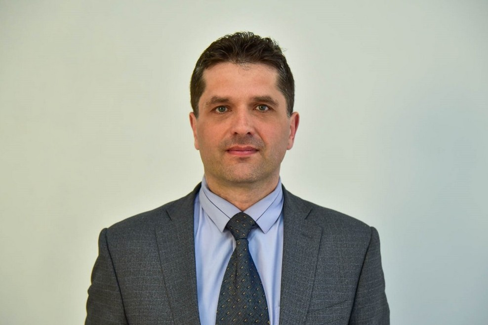 Нечаев Владимир Дмитриевич ректор Севастопольского государственного университета